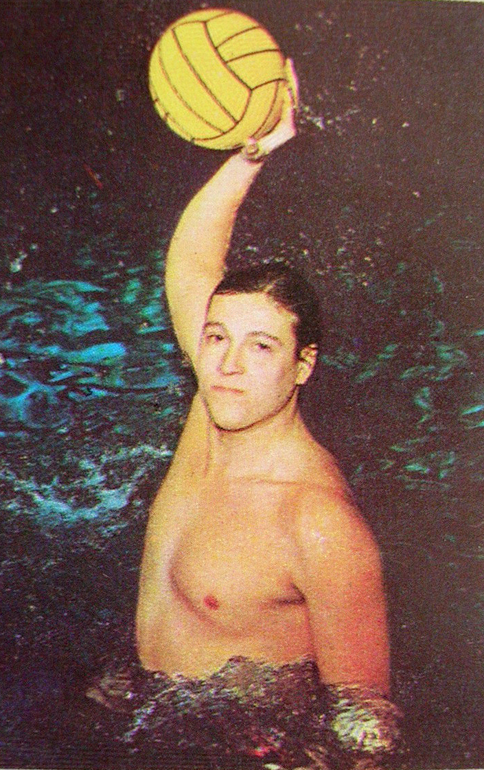 CAMPIONI DELLO SPORT 1970/71 # 233 - GIANNI DE MAGISTRIS - NUOVA